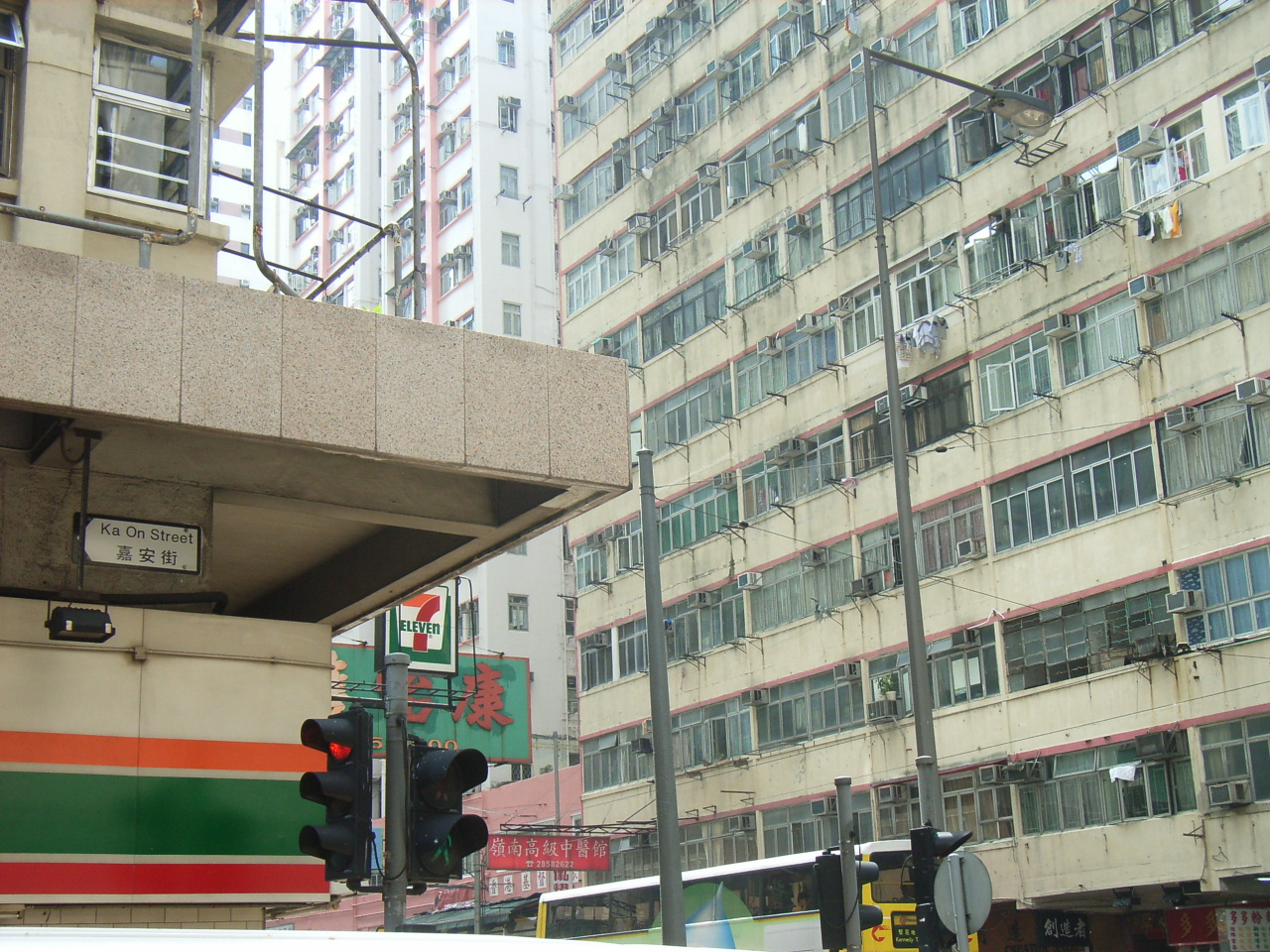 嘉安街